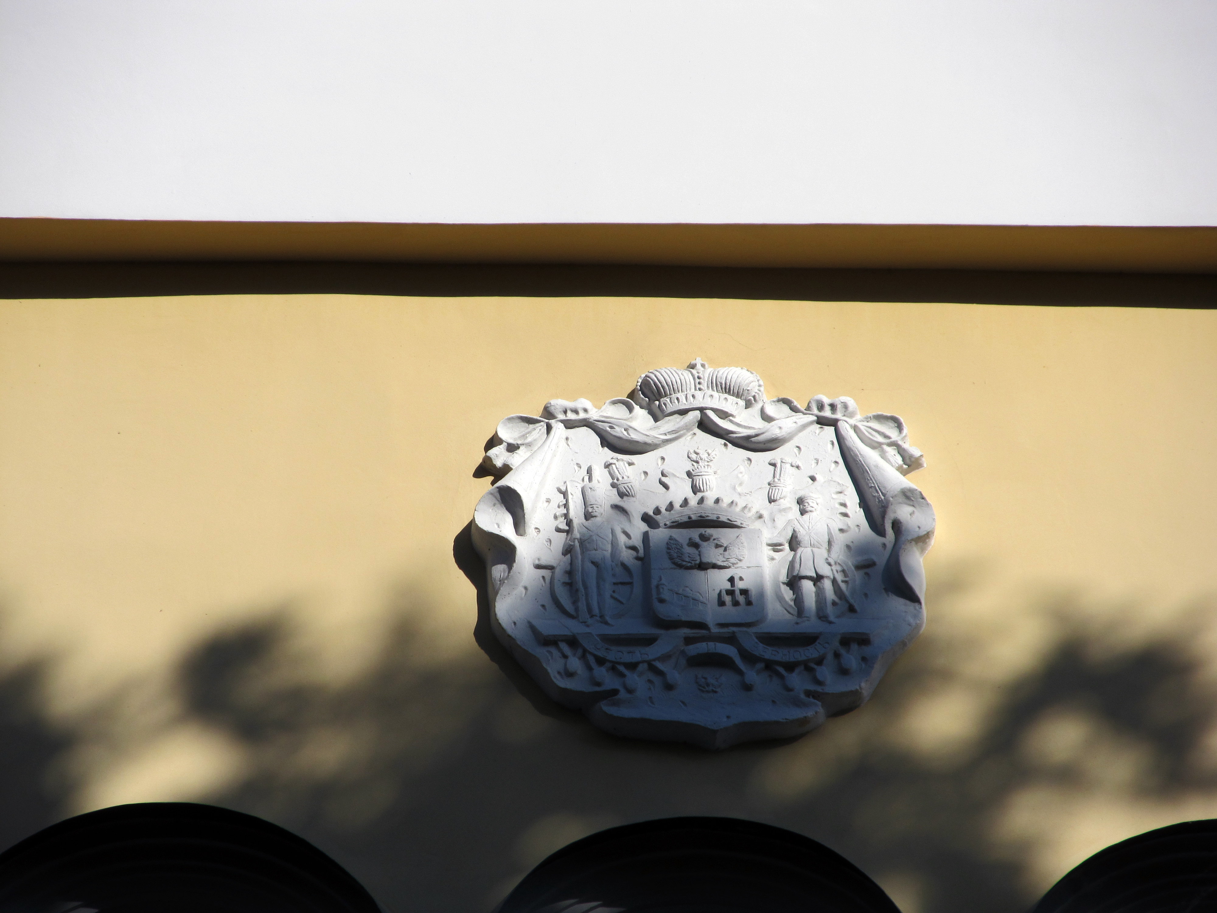 Беларуская (тарашкевіца): Палацава-паркавы ансамбаль: палац, дэкаратыўнае аздабленьне інтэр’ера вежы і цэнтральнай залі палаца, Петрапаўлаўскі сабор, капліца-пахавальня,парк. г. Гомель This is a photo of Belarusian heritage monument. Reference number: 310Г000044 ( WLM)